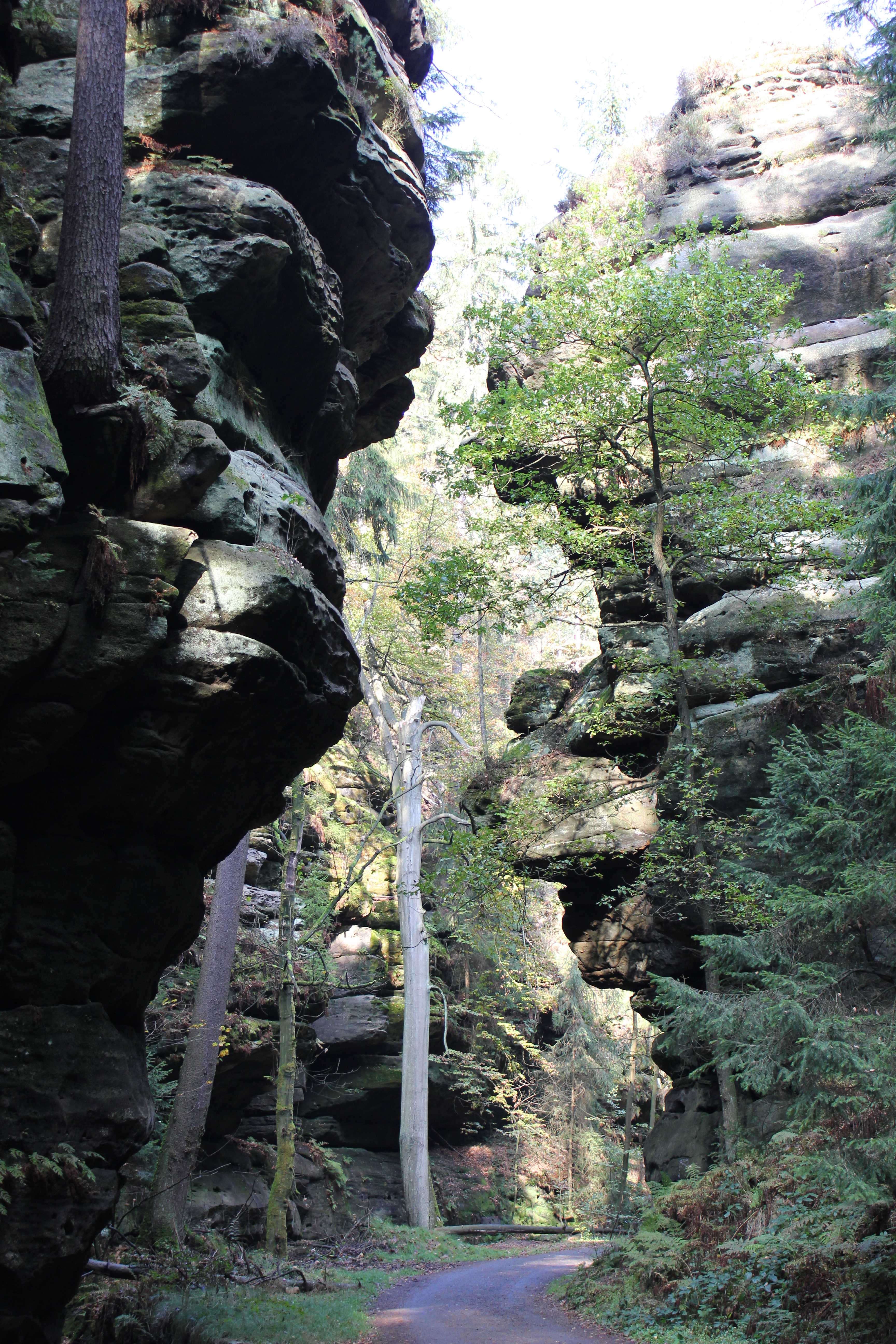 Sächsische Schweiz, Teil des sogenannten Höllenschlunds zwischen Rathen und Wehlen